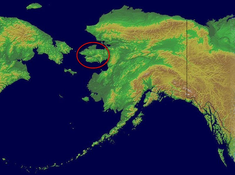 Lcalizzazione Penisola di Seward su mappa fisica Alaska